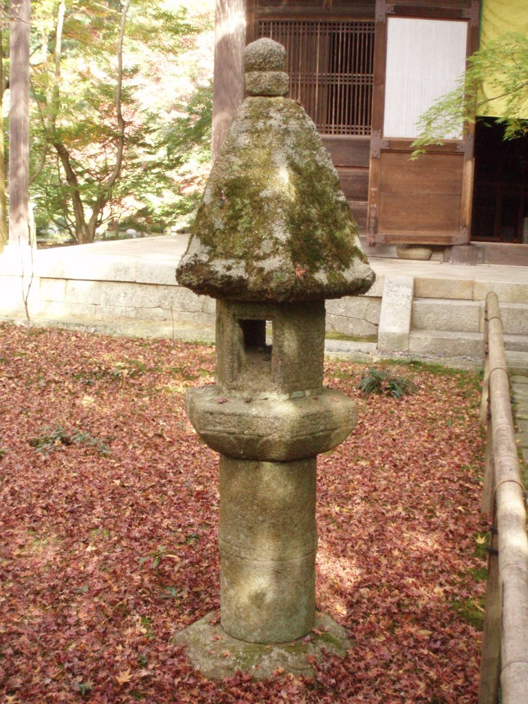 蓮華寺 (京都市左京区)の灯篭